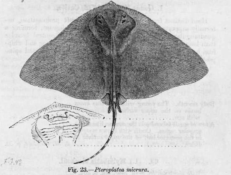 Pteroplatea micrura = Gymnura micrura (Bloch & Schneider, 1801)